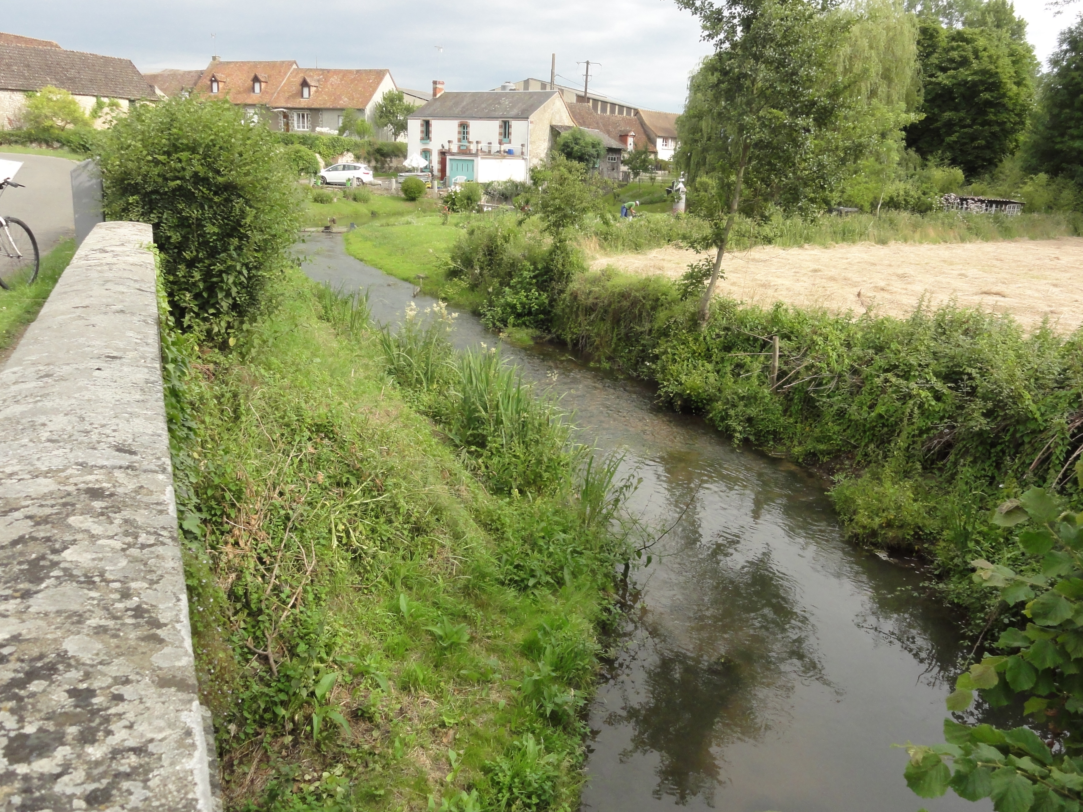 Grandchamp (Sarthe) la Bienne